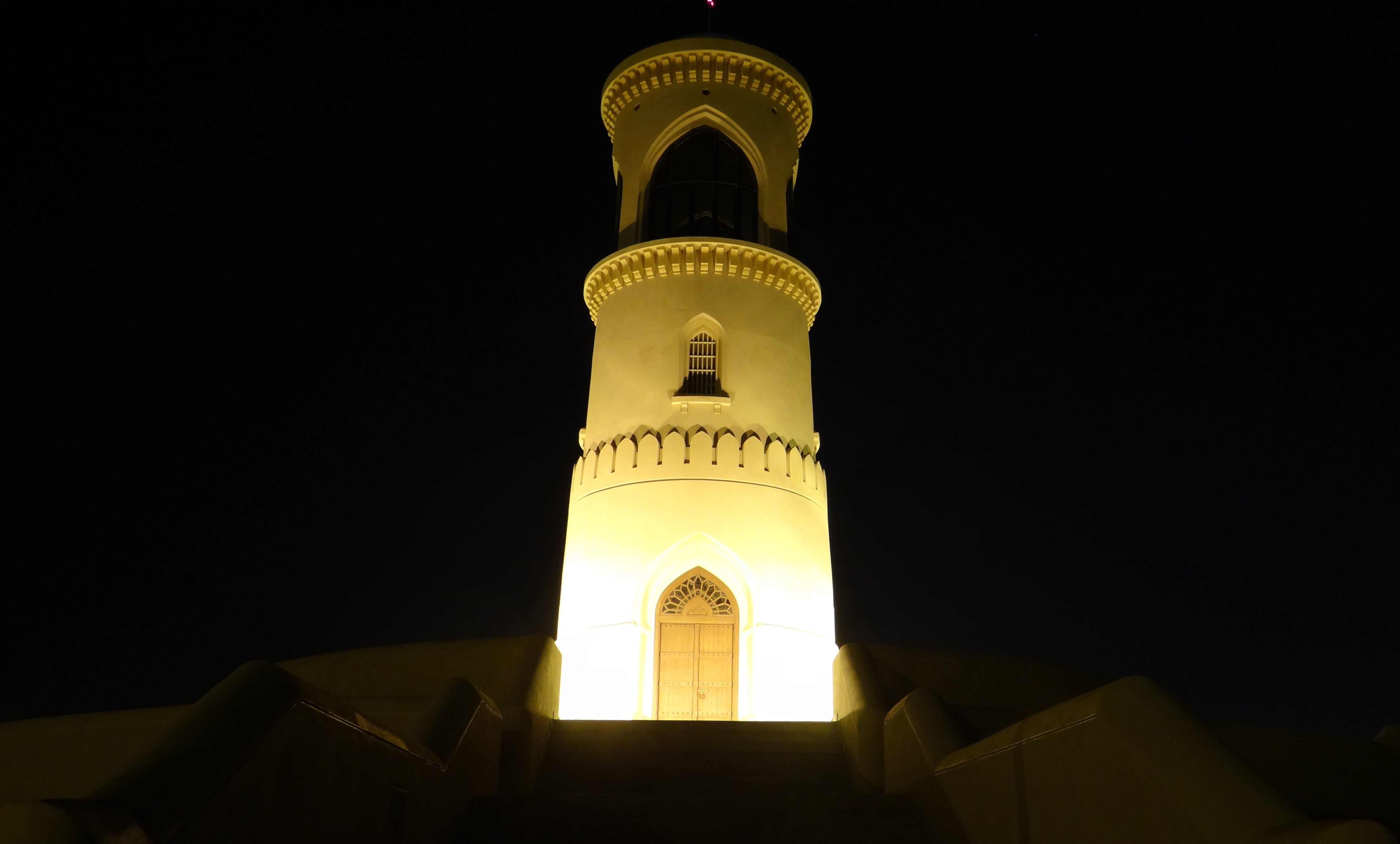 صورة ليلية لمنارة العيجة في ولاية صور ، سلطنة عمان